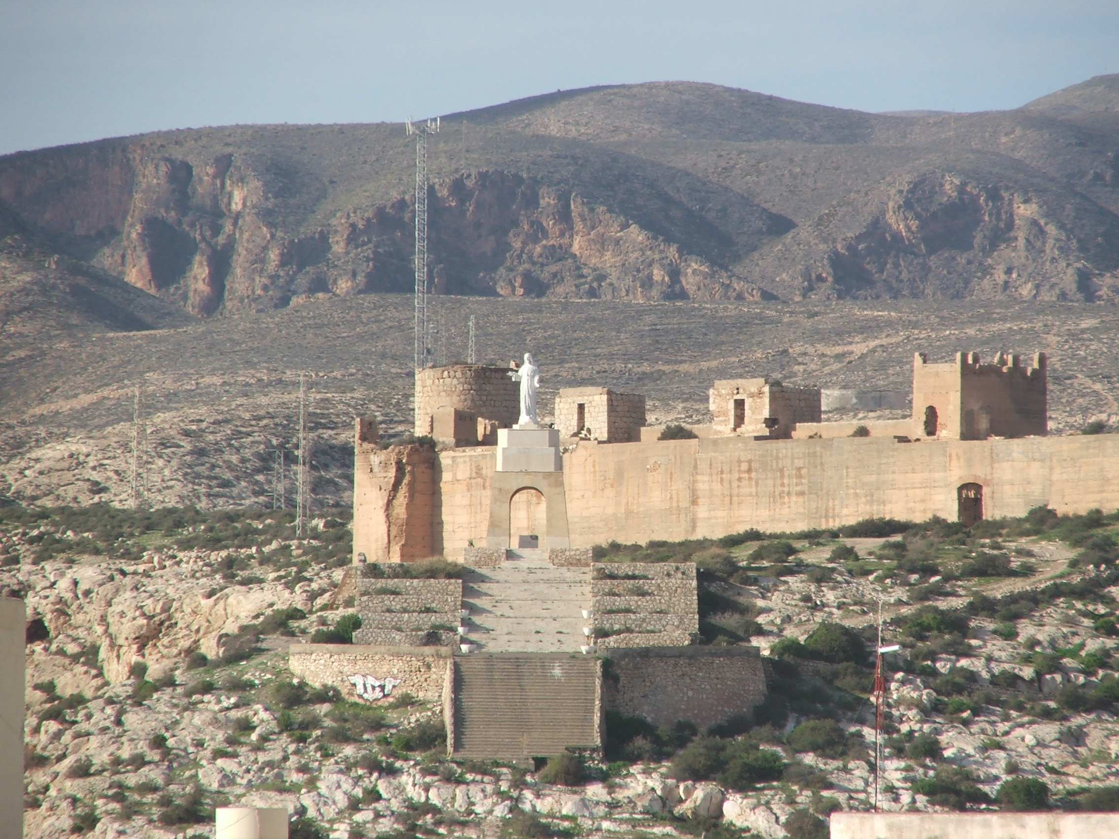 Fotografía de la estatua del Sagrado Corazón de Jesús en el cerro de San Cristóbal en Almería, Andalucía, España.